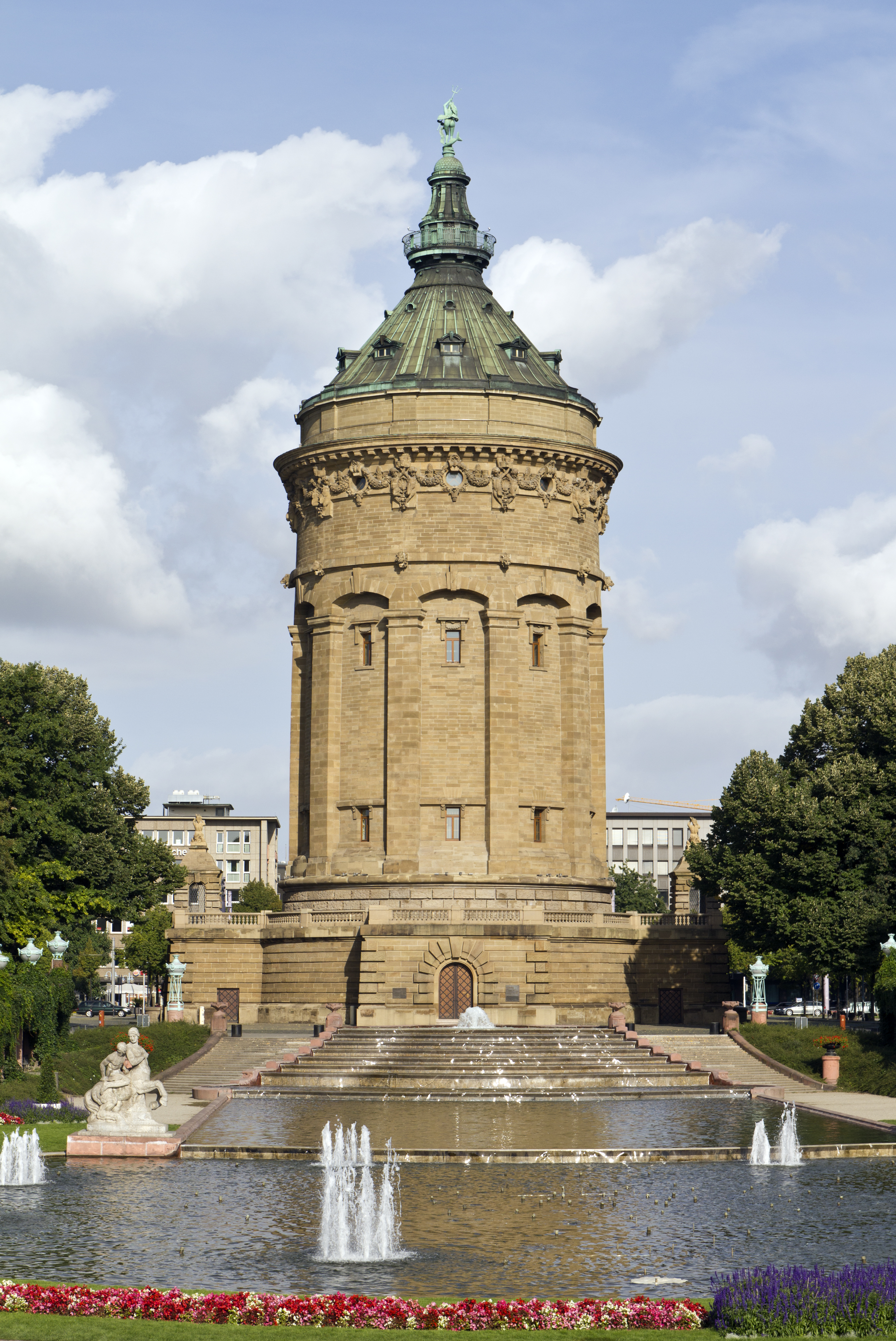 Mannheim, Wasserturm